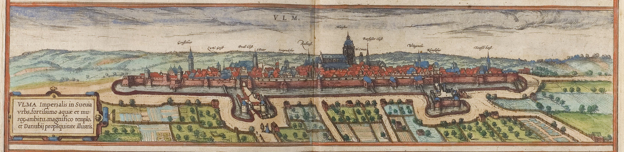 Ulm